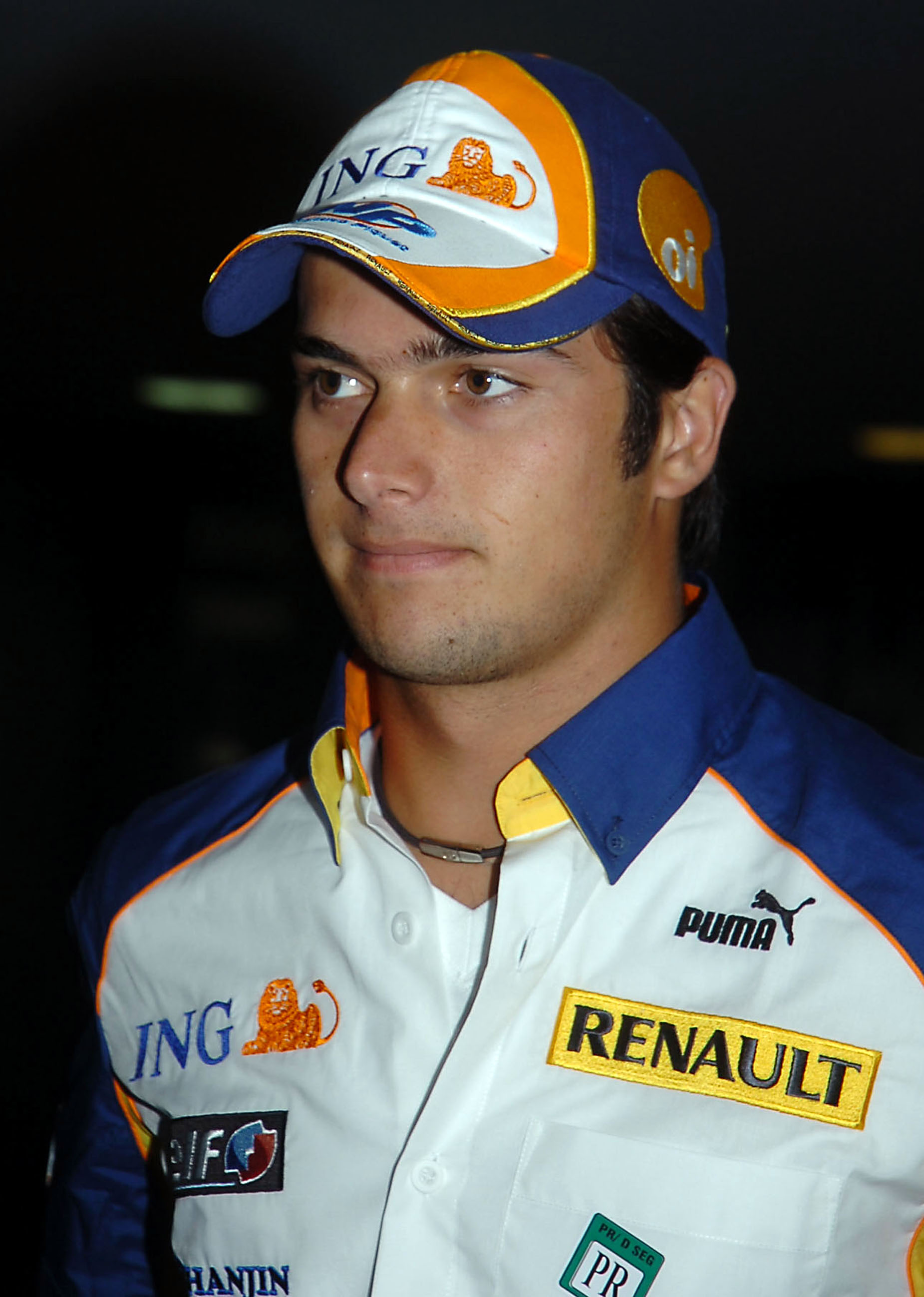 Imagem de piloto Nelson Angelo Piquet